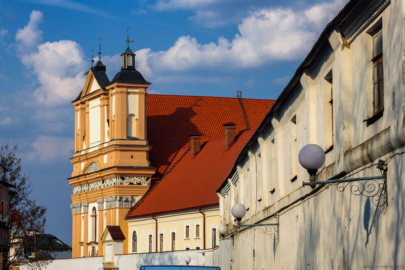 Гродна. Касцёл Дабравешчання Найсвяцейшай Дзевы Марыі і кляштар брыгітак